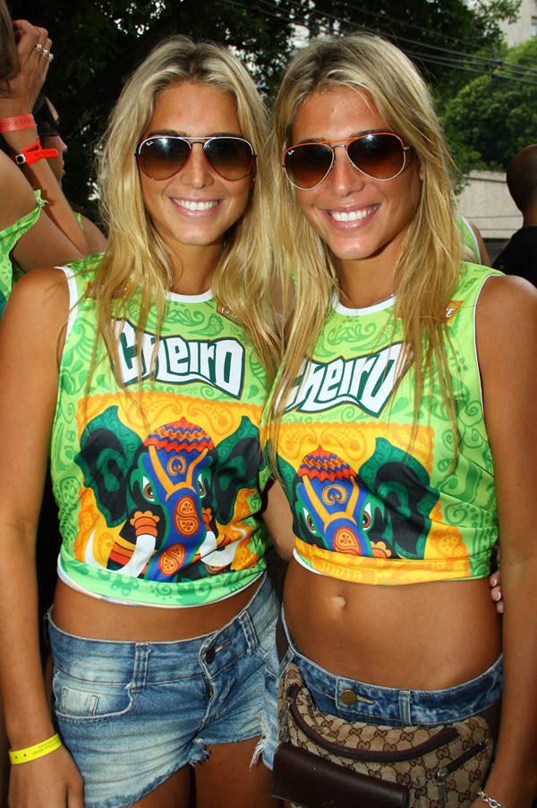 Bia e Branca Feres.